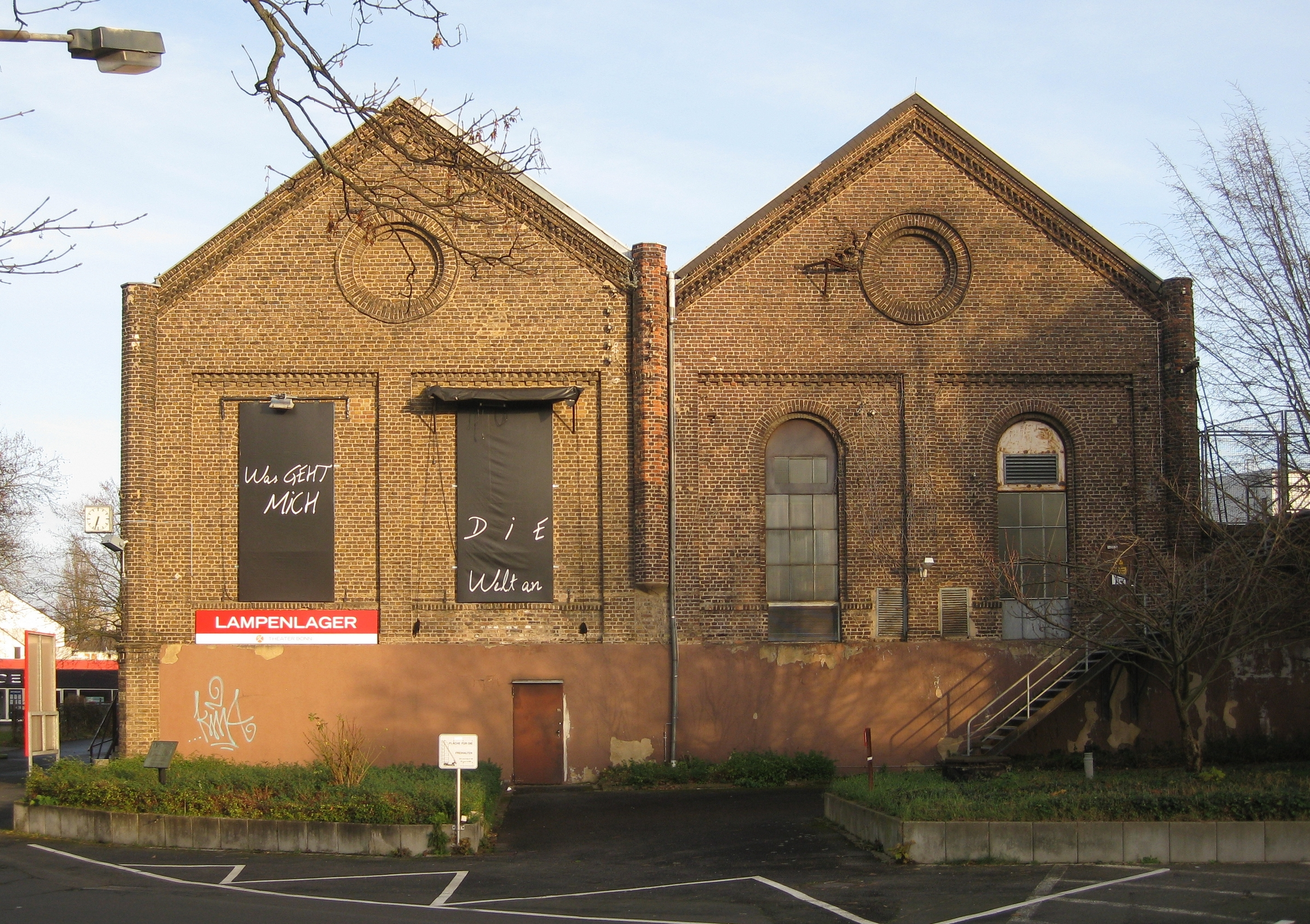 Deutschland, Bonn-Beuel, Siegburger Straße 42 (Bushaltestelle Pantheon Beuel): Fassade der Maschinenhalle (ehem. Spielstätte Lampenlager) auf den als Baudenkmal geschützten Fabrikanlagen einer ehemaligen Jutefabrik (gegr. 1868). Seit 1981 ist das Gelände im Besitz der Stadt Bonn. Zum Zeitpunkt der Aufnahme war das Bonner Theater (Schauspiel & Oper) Nutzer des Hallenkomplexes mit seinen Schauspielhallen; genannt „Halle Beuel“. Dort sind neben Probe- und Aufführungsbühnen auch Verwaltungsbüros, Werkstätten für Bühnenbau, Kostümschneiderei, Maskenbildnerei und Lager untergebracht. Für Publikumsaufführungen wurden drei Hallen genutzt: die eigentliche "Halle Beuel, "Lampenlager" und "Alter Malersaal". Auf dem Gelände verfügt auch die Freiwillige Feuerwehr Beuel über Garagen mit Einsatzfahrzeugen und ein Büro.